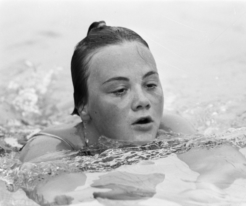 Hennie Penterman